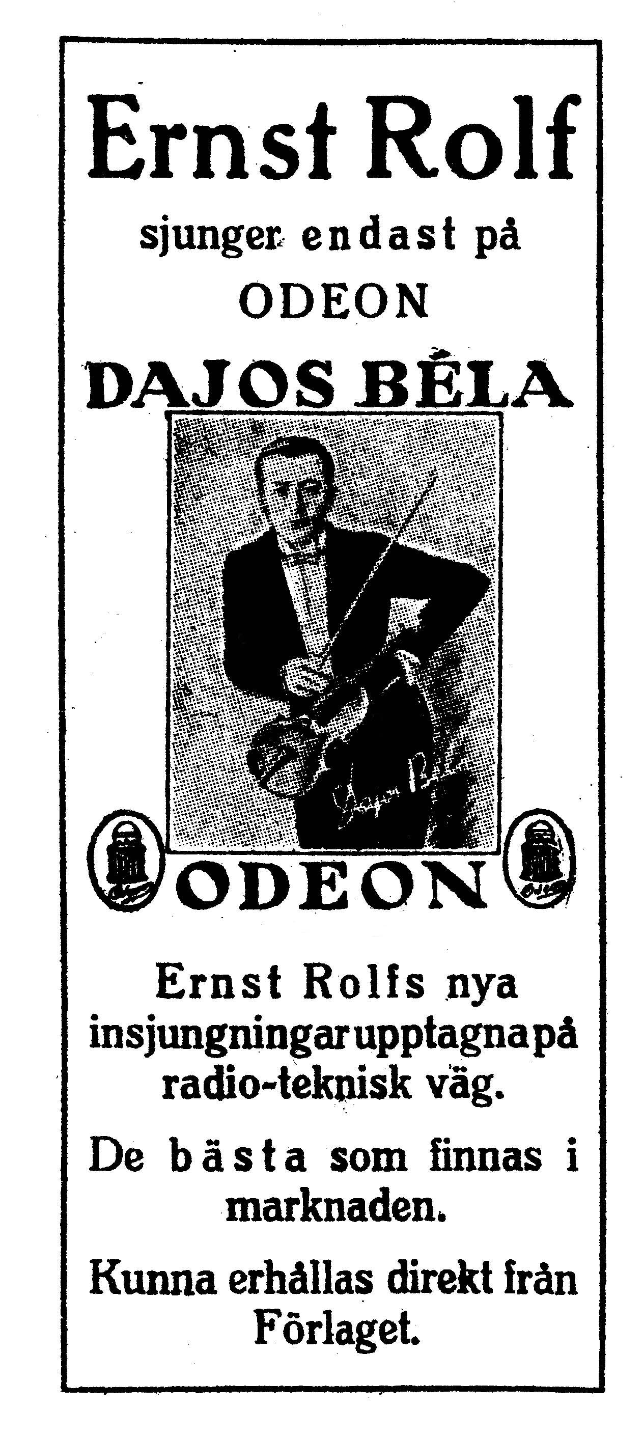 Den tyske kapellmästaren Dajos Béla på en annons i ett nothäfte från Ernst Rolfs Musikförlags A.B. 1927. Bildkälla: Fredrik Tersmedens samling.